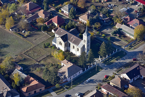 Szent Vendel templom a magasból